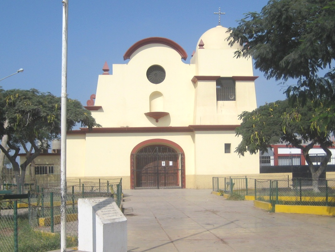 Capilla ubicada en la Plazuela de Comatrana, ciudad de Ica en el Perú. En su interior se encuentra la efigie del "Señor de la Esperanza" y otras.